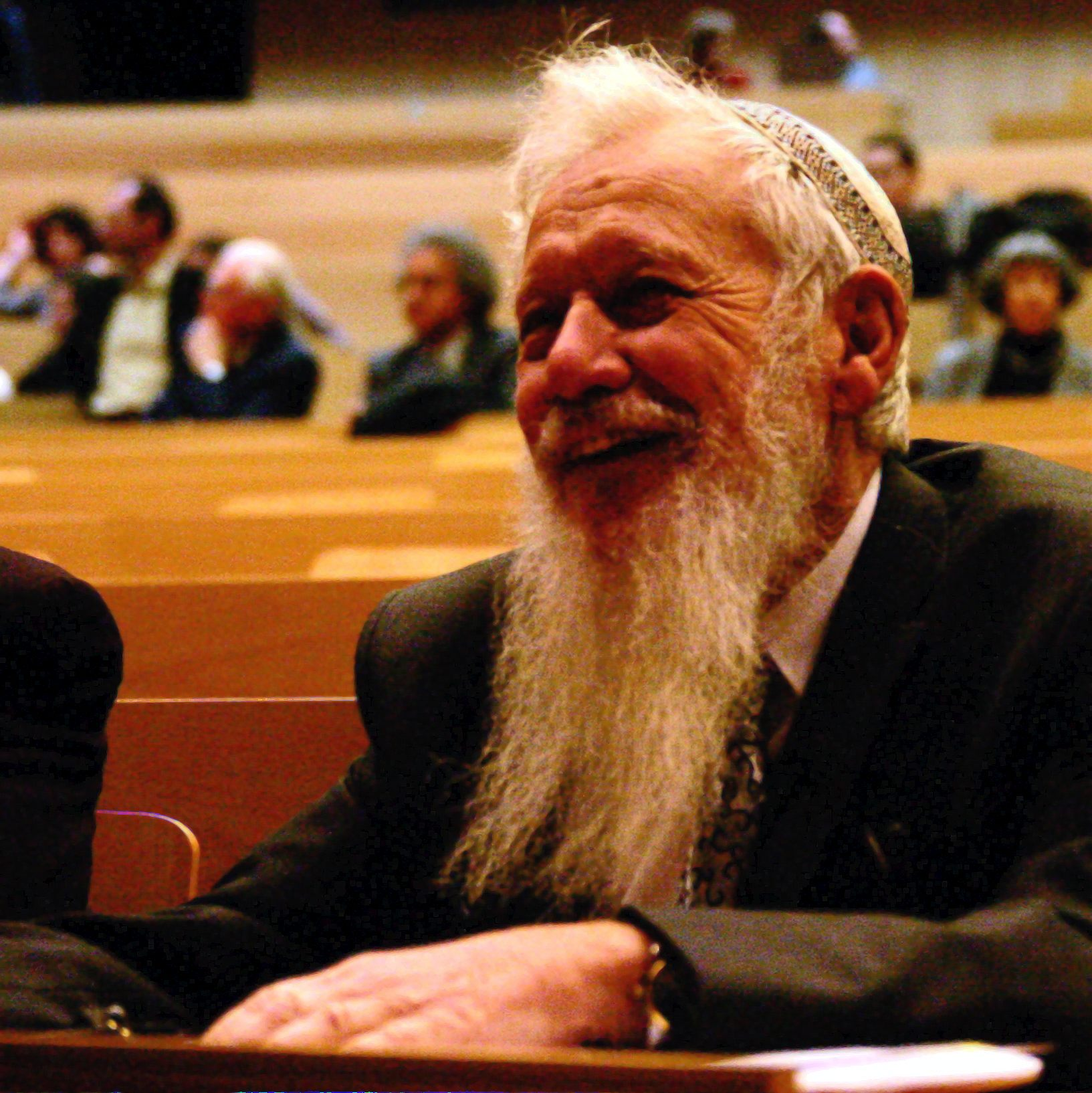 Robert Aumann à la Journée de la Recherche, le 16 septembre 2006 à l'EPFL